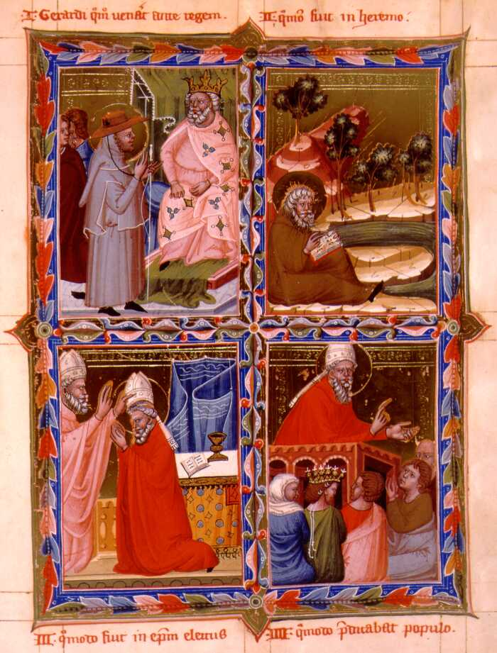 Szent Gellért a Magyar Anjou-legendáriumban Szent Gellért Szent István király előtt Szent Gellért a remeteségben Szent Gellért püspökké választása Szent Gellért prédikál a népnek